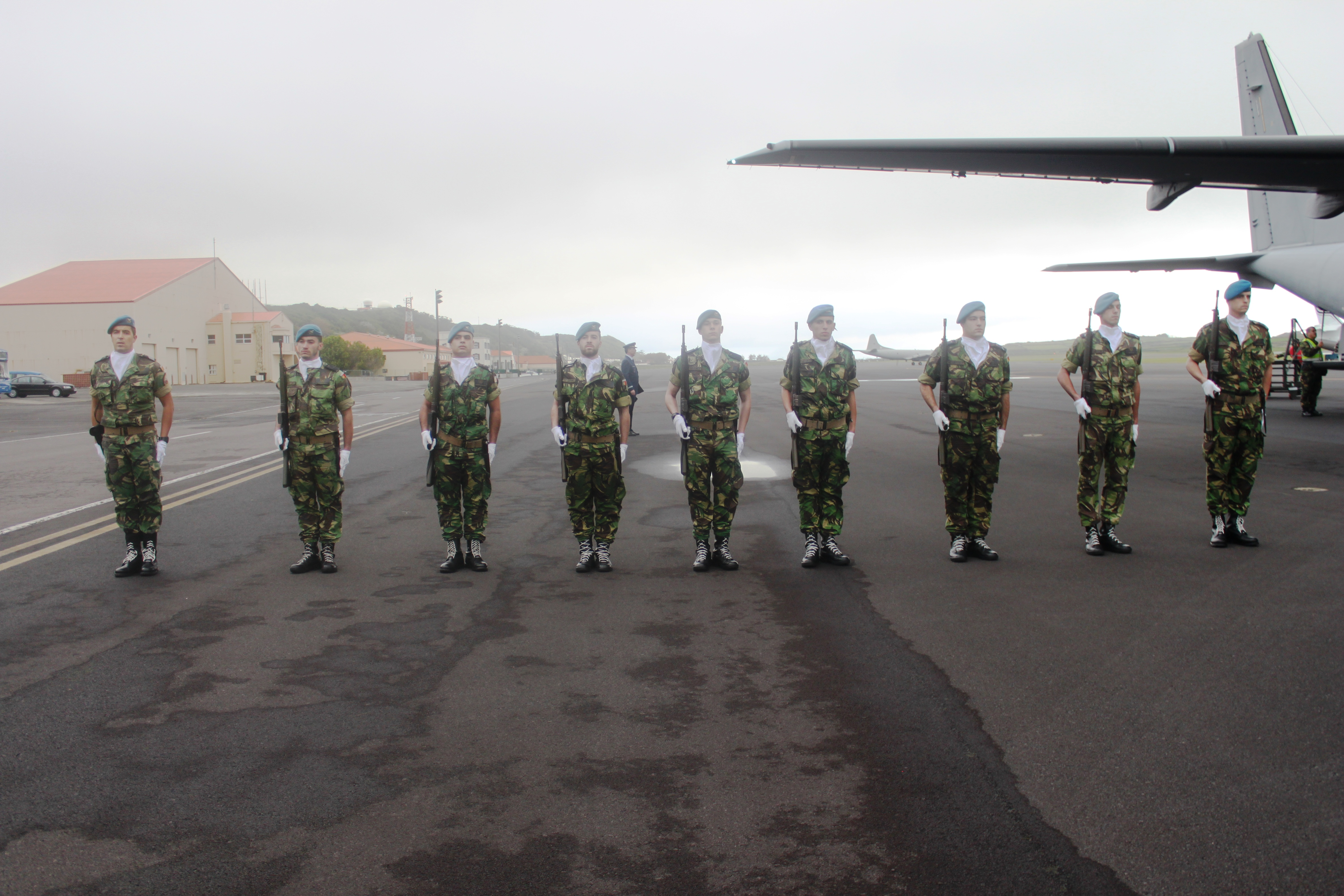 Foto ilustrativa